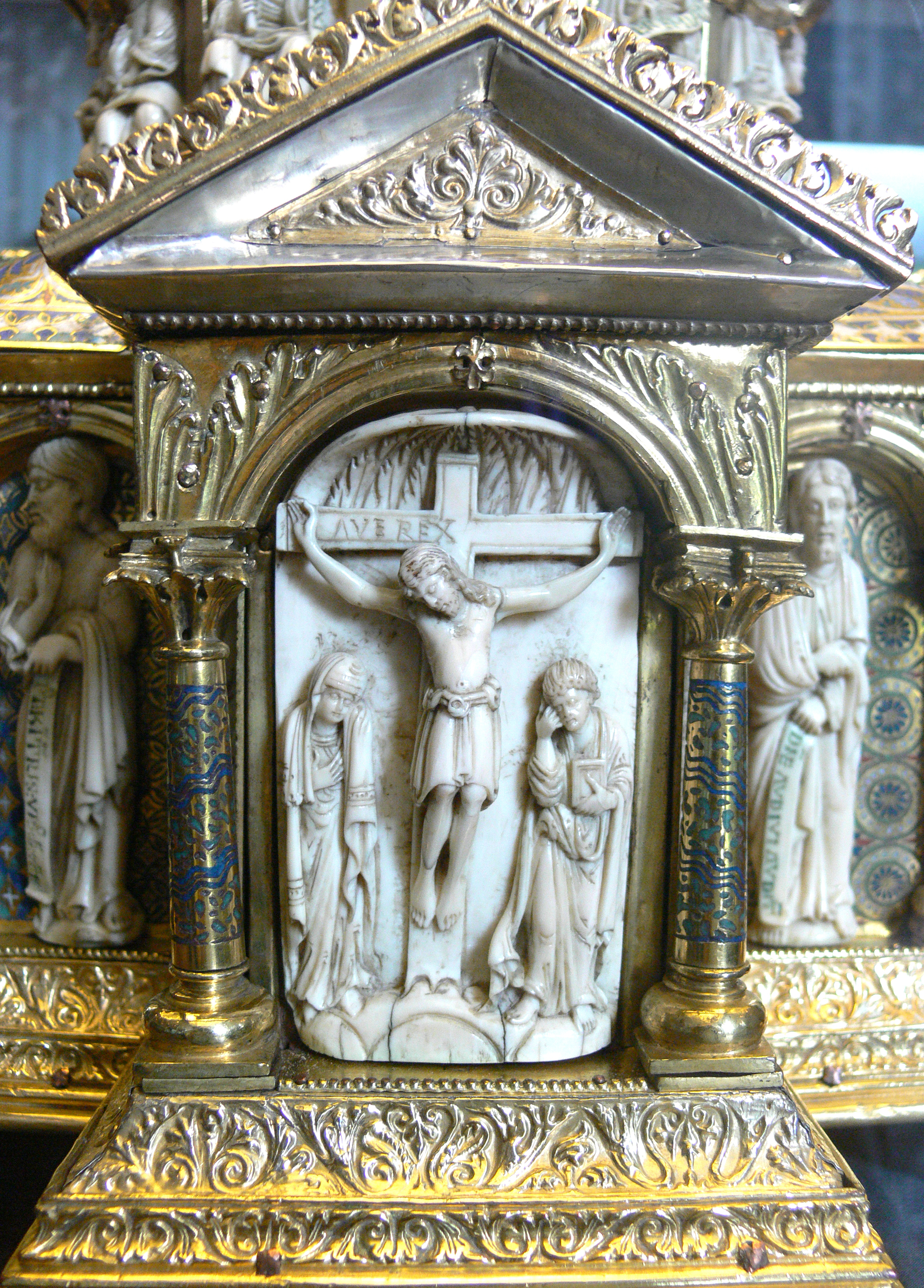 Kuppelreliquiar aus dem Welfenschatz, Köln, Ende 12. Jh.; Kunstgewerbemuseum Berlin Relief Kreuzigung